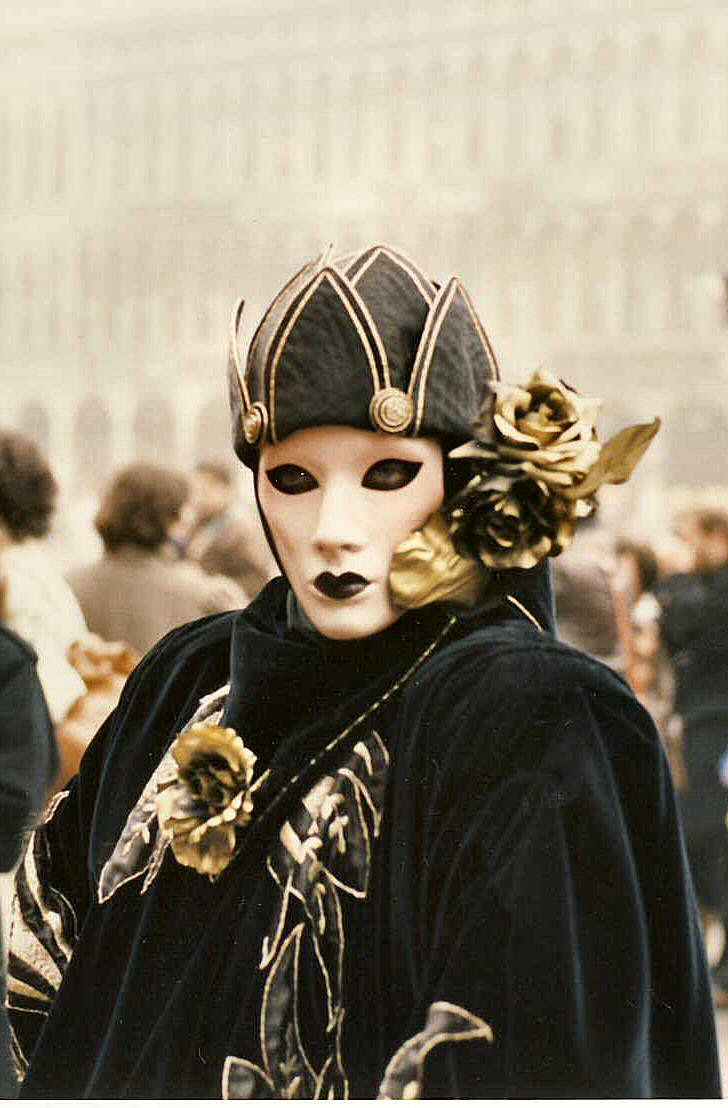 Carnival of Venice/Carnaval de Venise